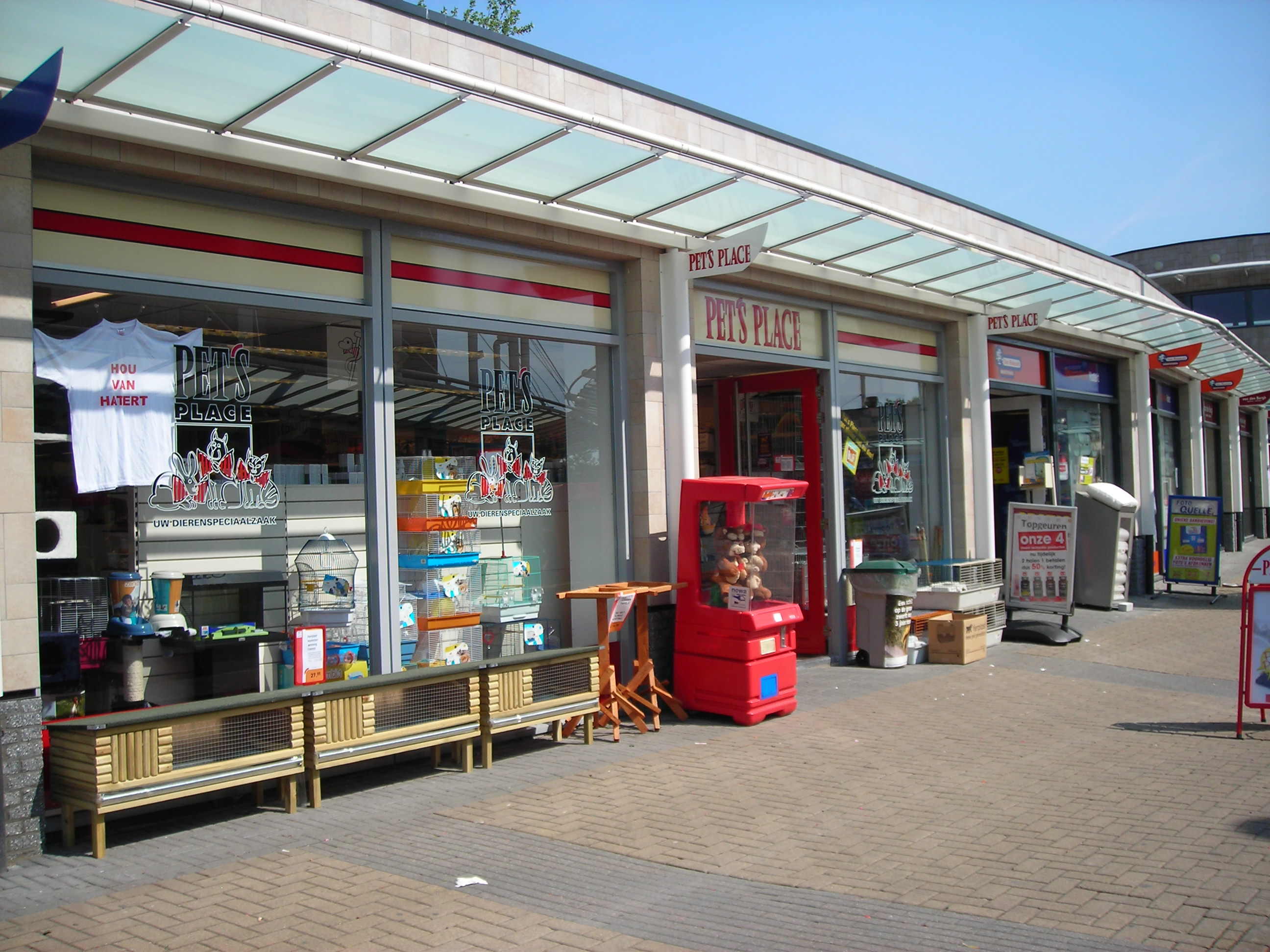 A Pet's Place store in Hatert, Nijmegen